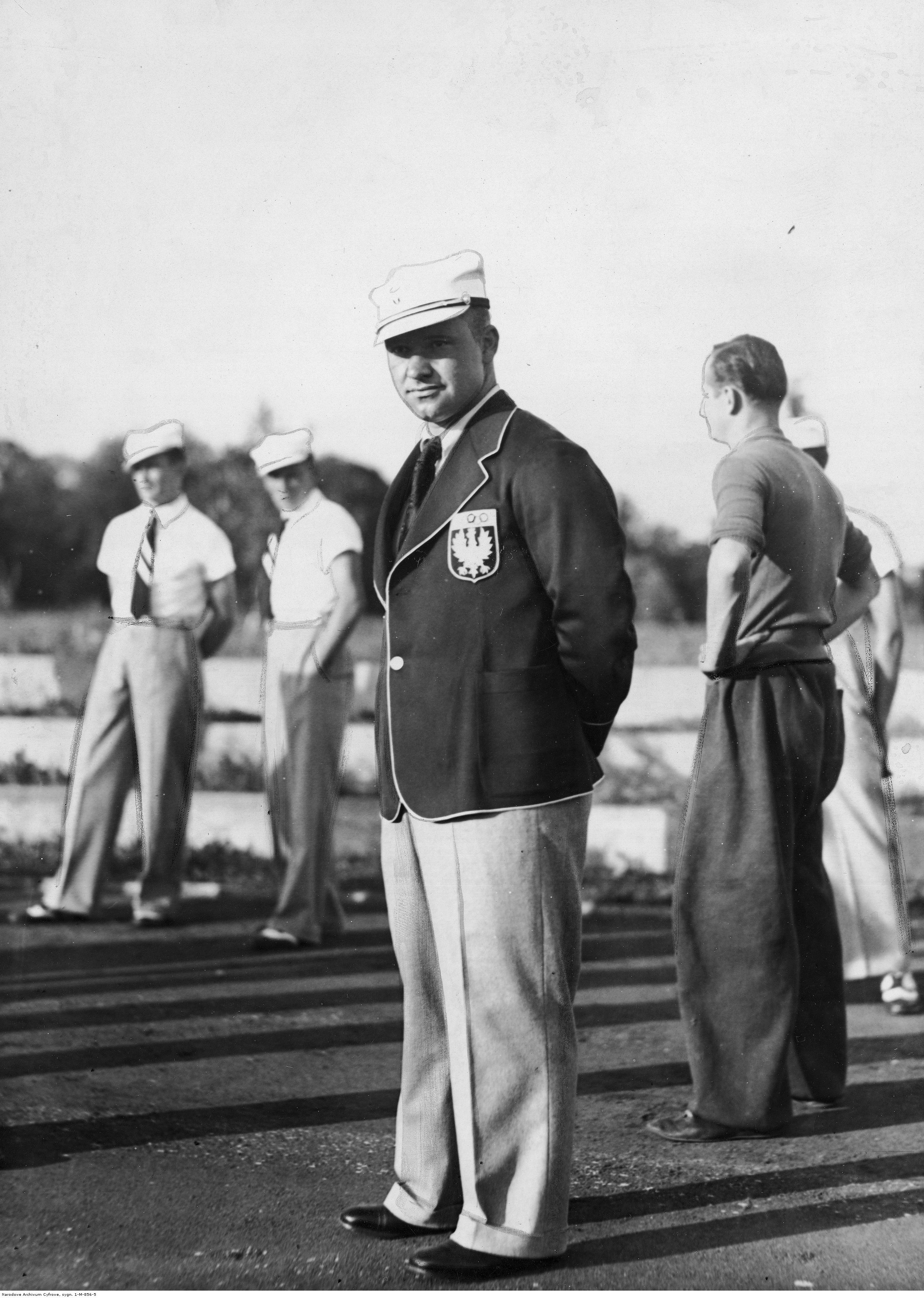 Olimpijczyk piłkarz Henryk Martyna w stroju reprezentacji Polski podczas próbnej defilady polskich sportowców przed Letnimi Igrzyskami Olimpijskimi Berlin 1936 na terenie Centralnego Instytutu Wychowania Fizycznego w Warszawie.